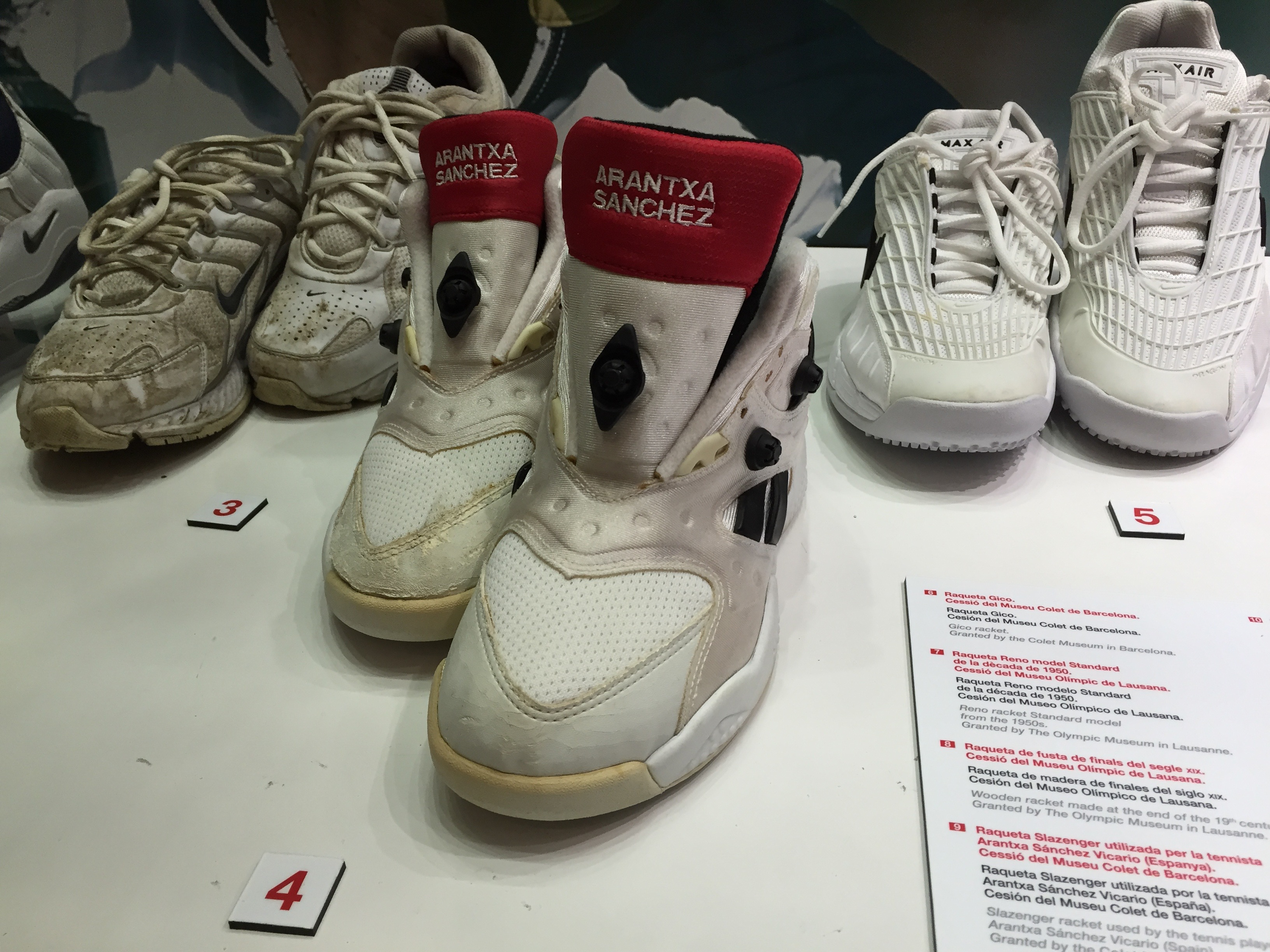 Collections of the Museu Olímpic i de l'Esport Joan Antoni Samaranch